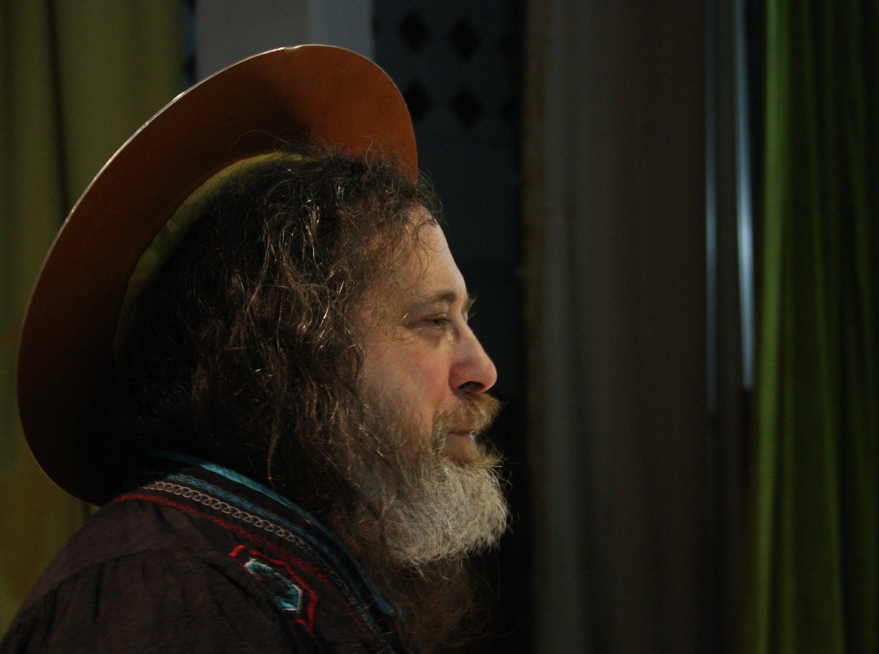 Richard M. Stallman en personnage de St IGNUcius à Monastir